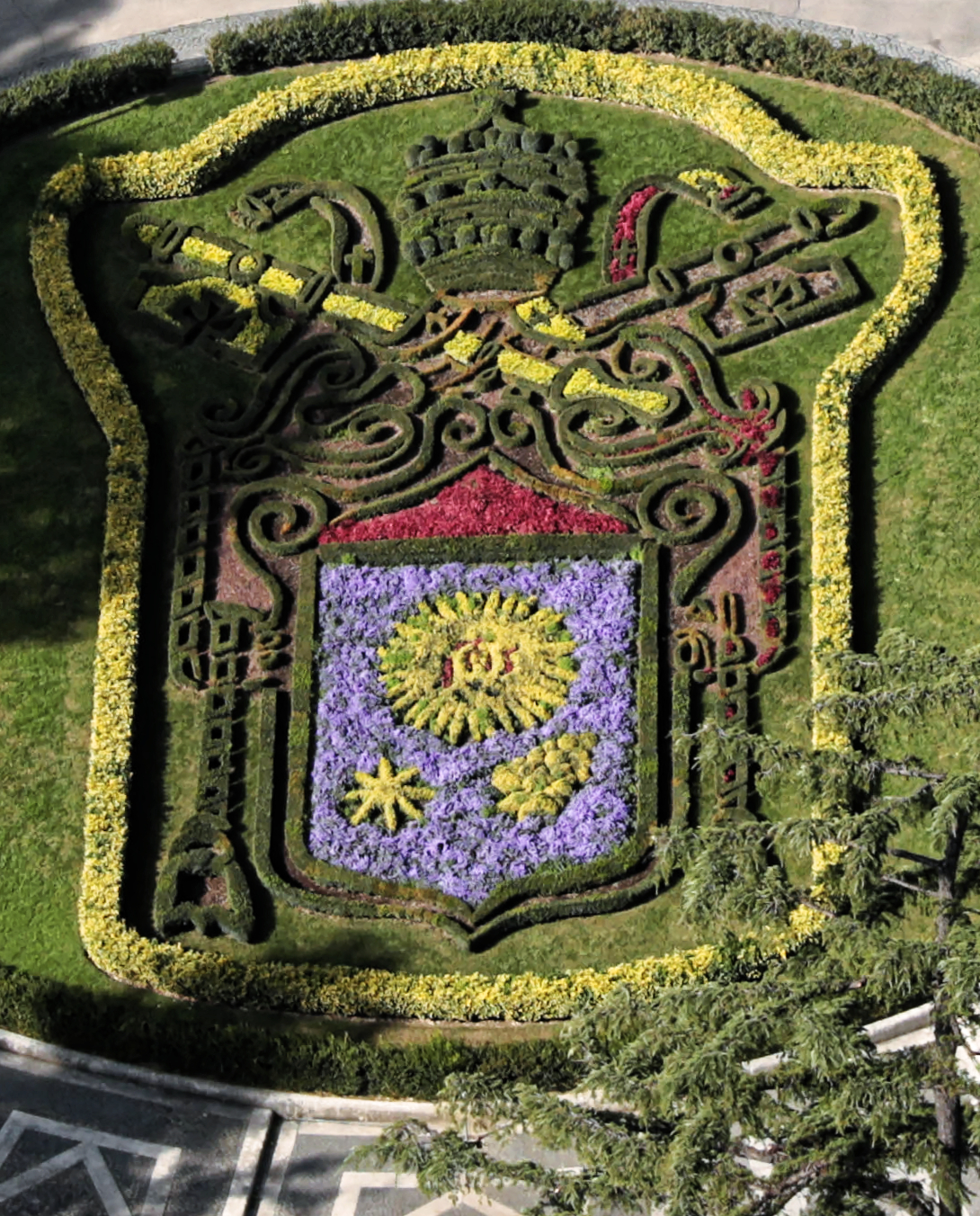 Vatikanische Gärten von der Kuppel des Petersdoms aus fotografiert